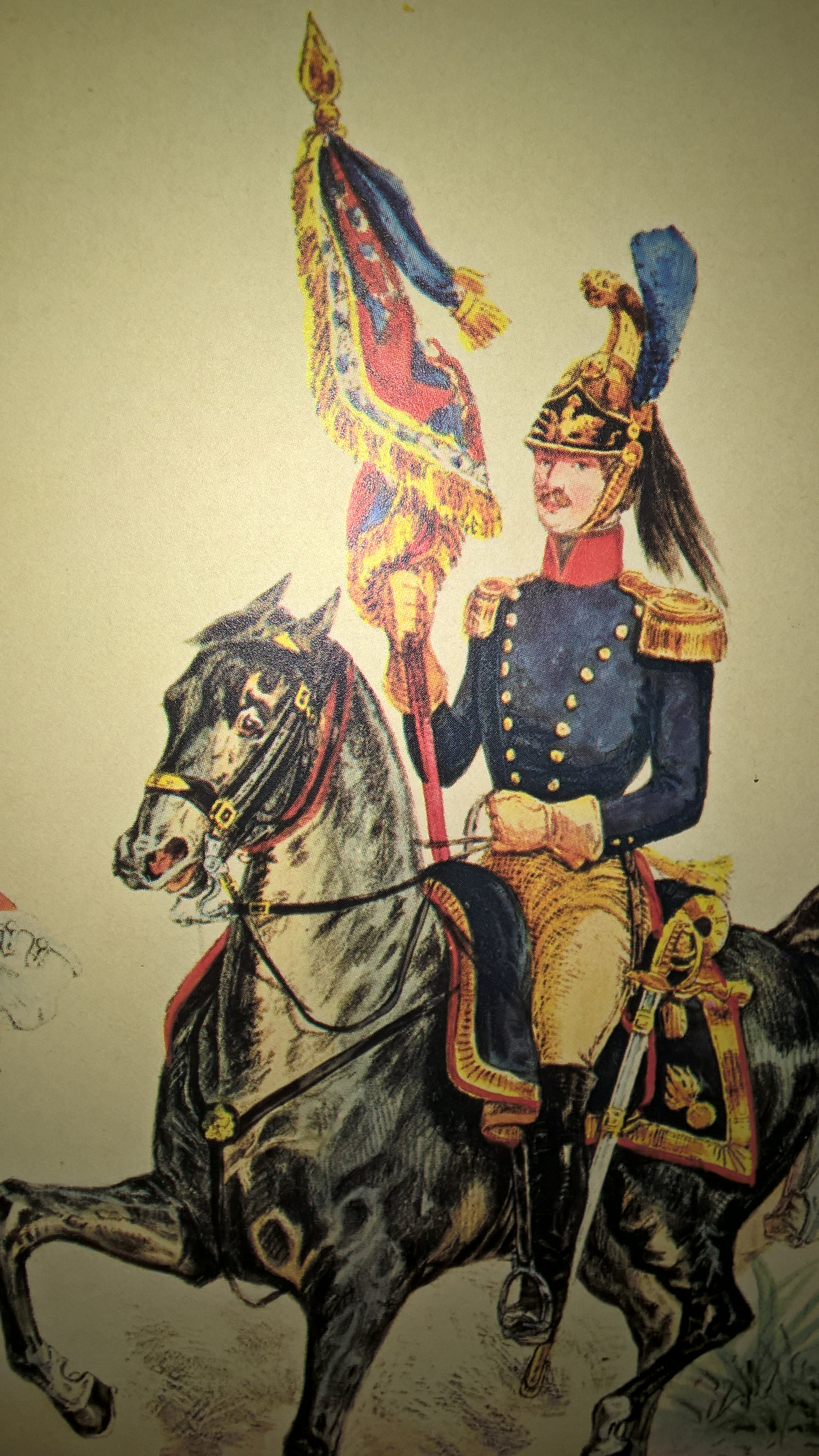 Porta Stendardo di Piemonte Reale, Regno di Carlo Alberto (1827). Incisione ottocententesca ripresa da un calendario dell'Esercito Italiano